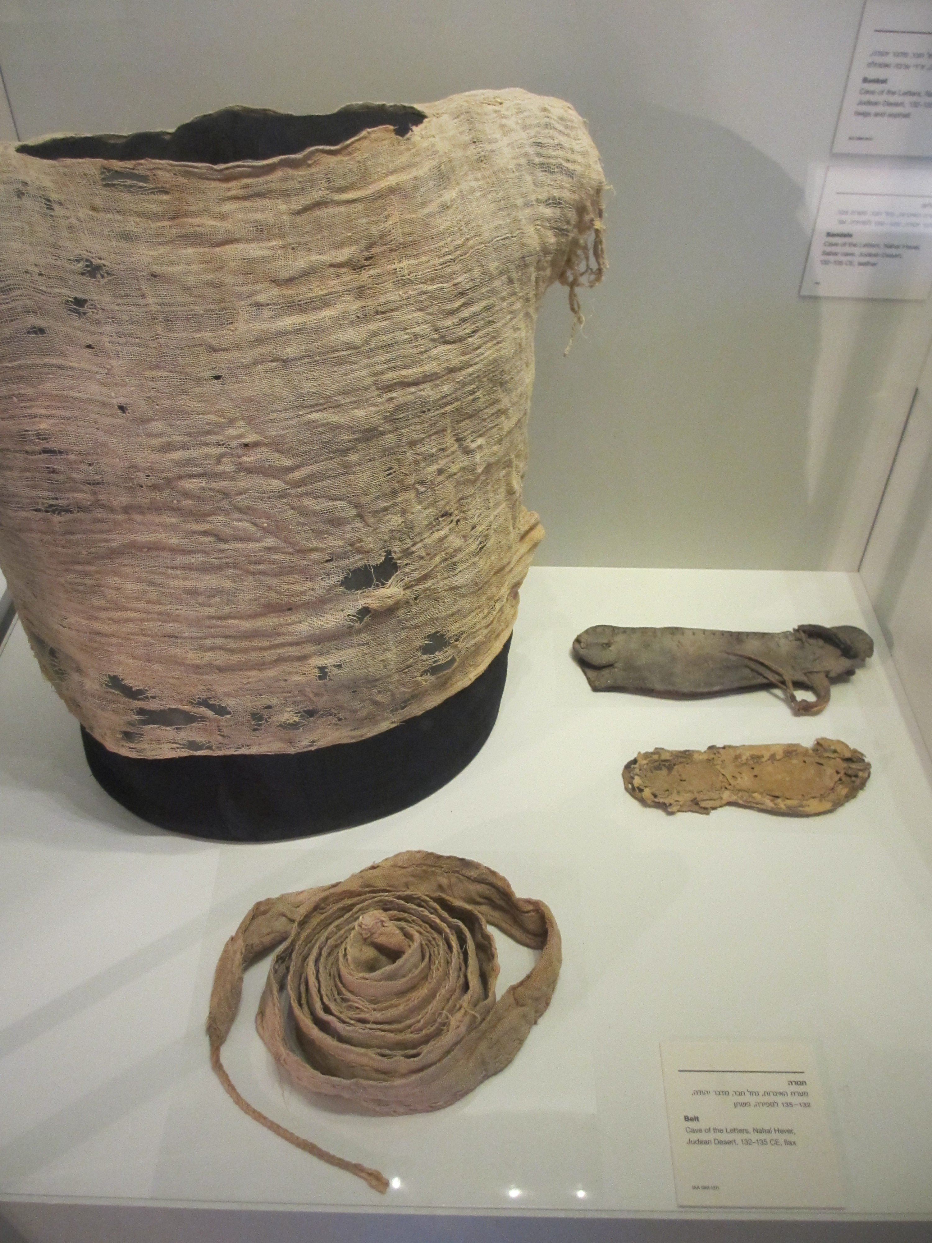 Clothes. Cave of the Letters, Nahal Hever (132-135 CE). Israel Museum, Jerusalem